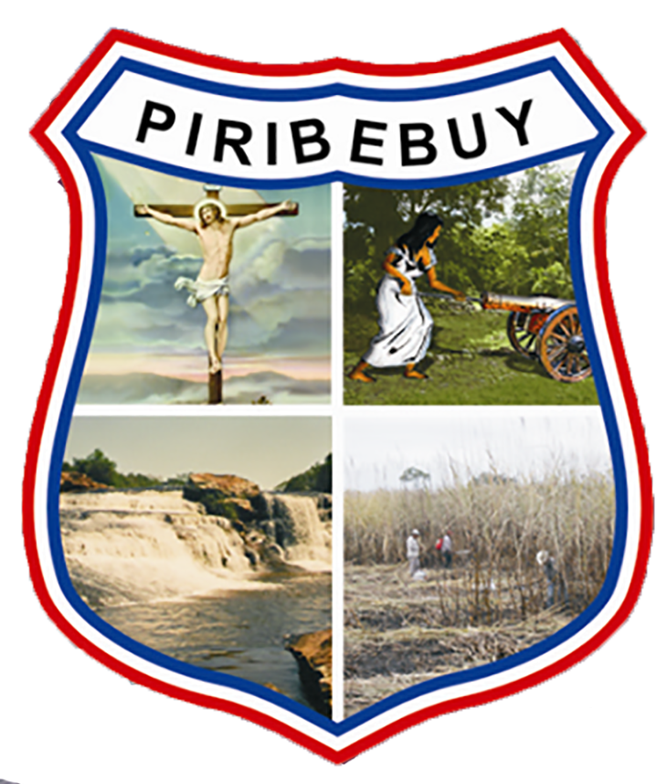 Escudo de Piribebuy